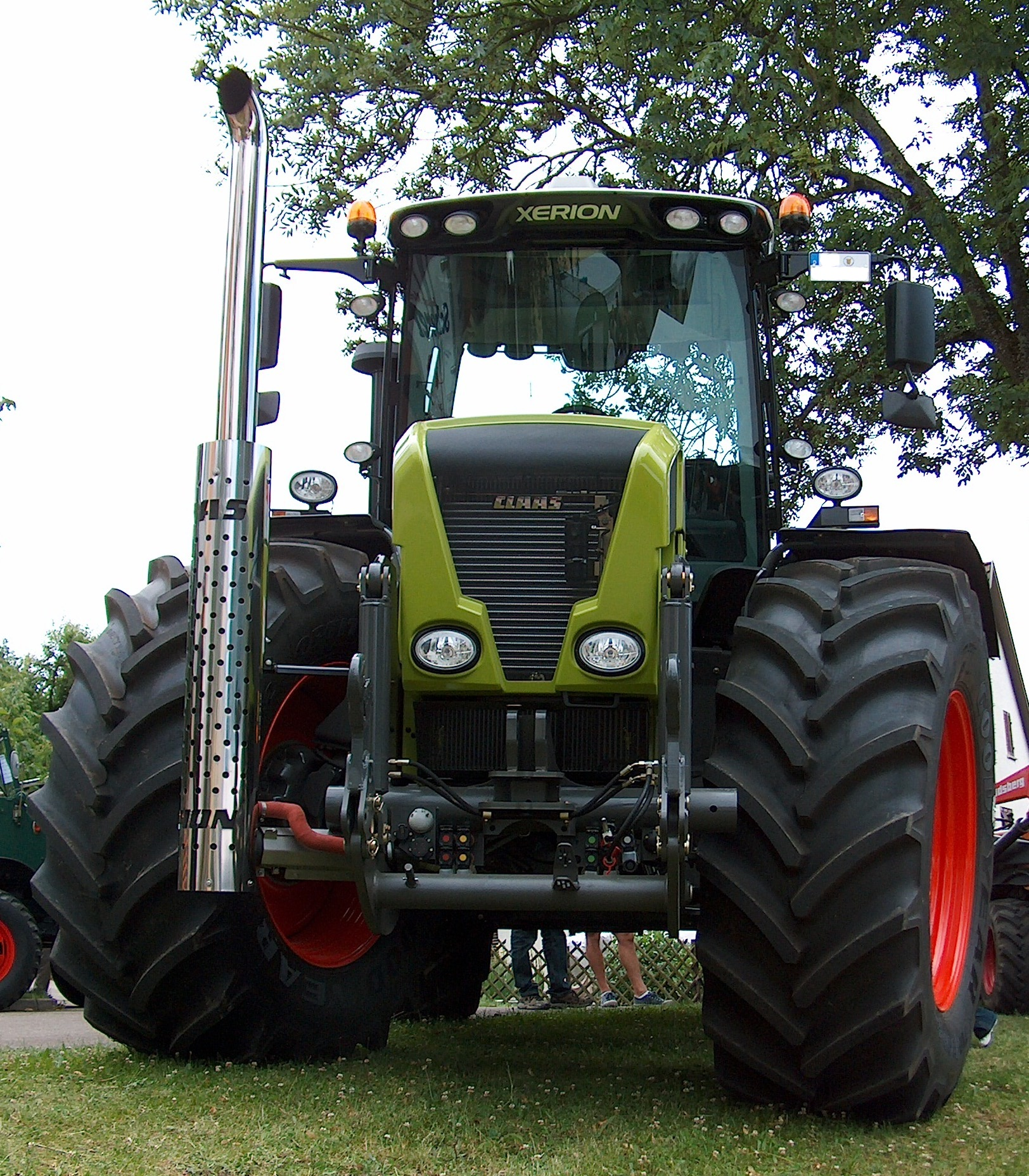 Claas Xerion 3800 Trac VC, Vorderansicht